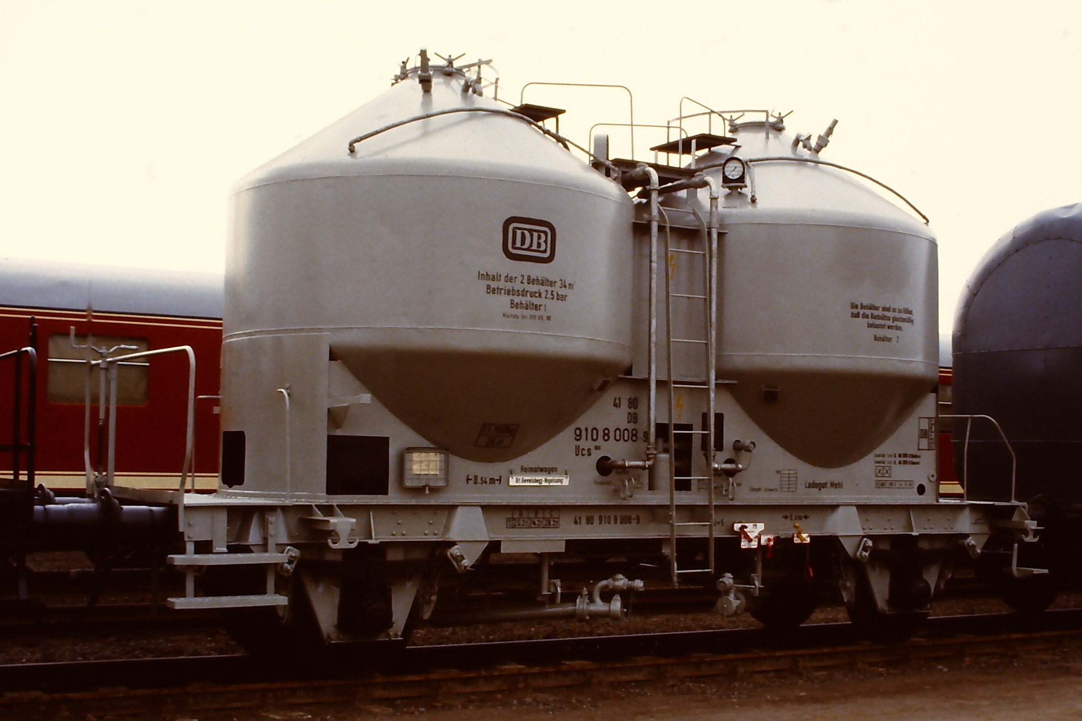 Silowaggon Ucs 909, ausgestellt auf der Ausstellung 150 Jahre Eisenbahn in Deutschland in Bochum-Dahlhausen